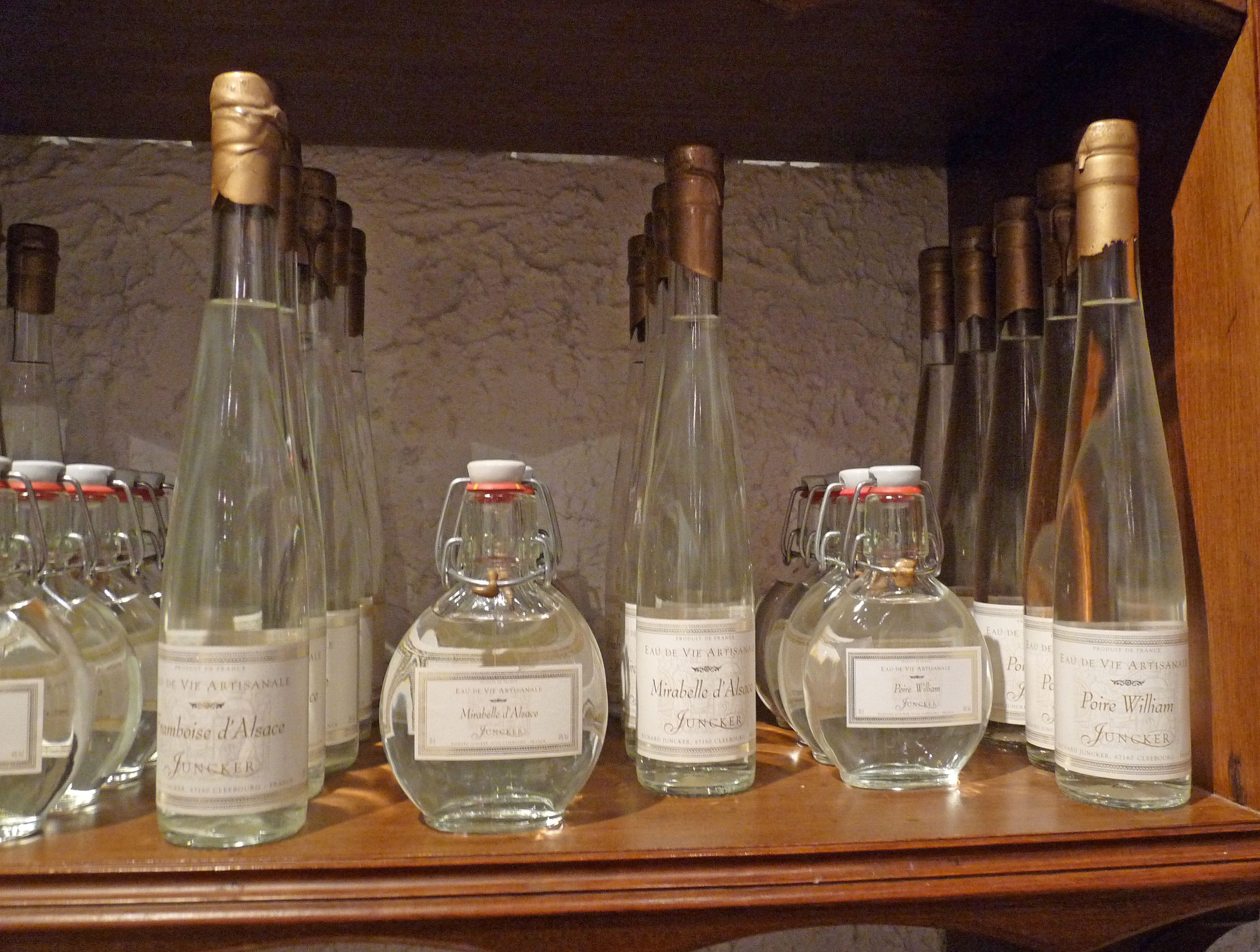 Eaux-de-vie d'Alsace à la Cave vinicole de Cleebourg (Bas-Rhin)